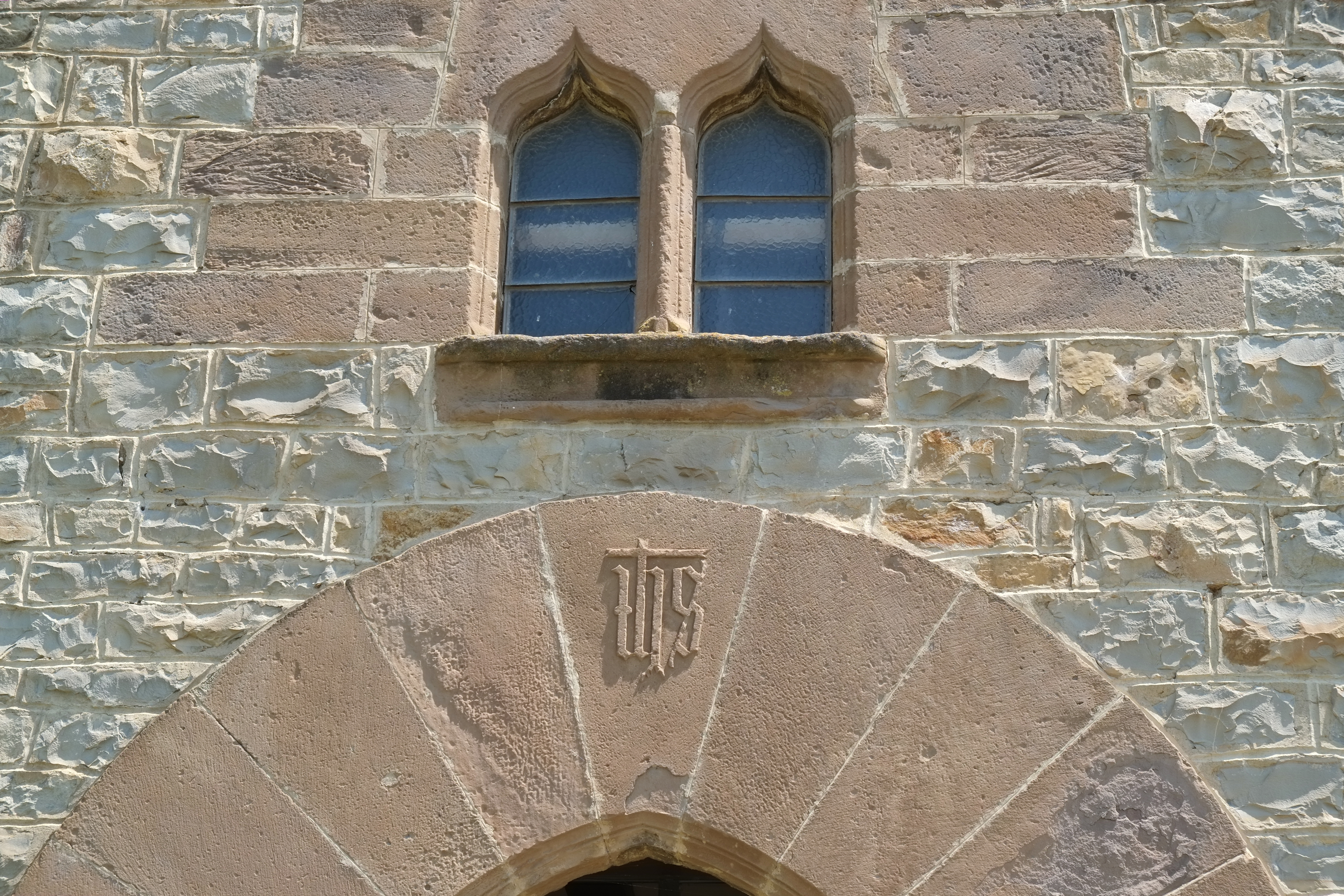 Kirche San Esteban in Yesa in Navarra (Spanien)